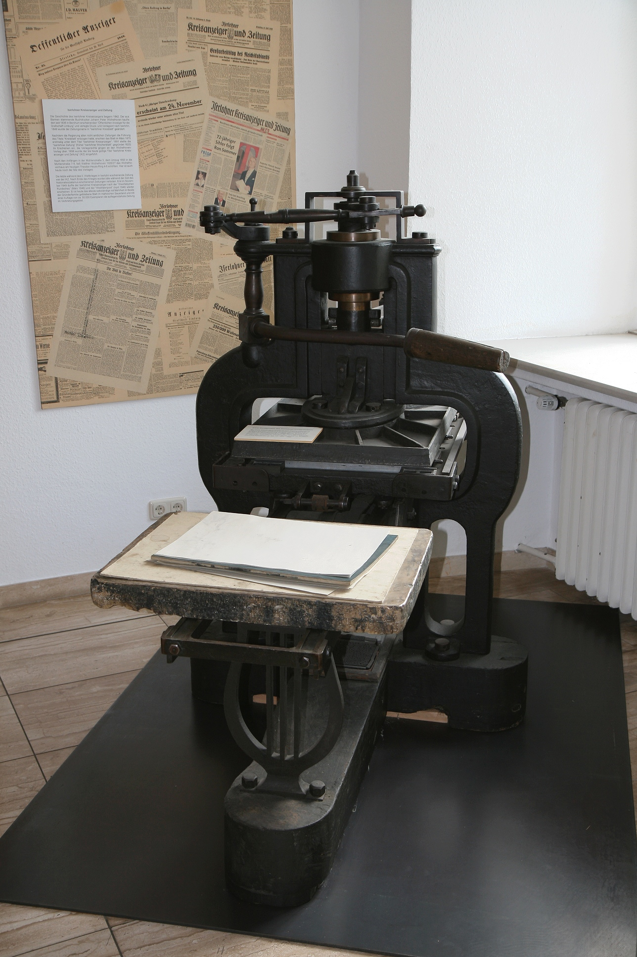 Erste Druckpresse (Stanhope Press) der Zeitung Iserlohner Kreisanzeiger und Zeitung. Exponat des Stadtmuseums in Iserlohn.